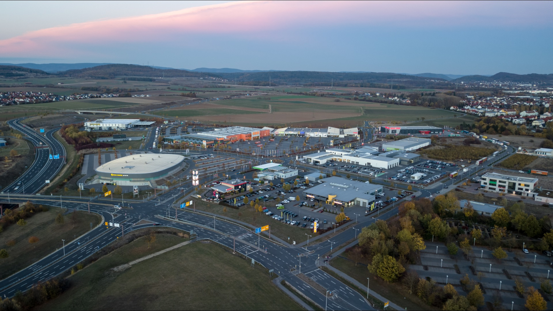 Gewerbegebiet "Lauterer Höhe" im Norden Coburgs im Herbst 2018. Im Hintergrund erkennt man - von Westen nach Osten führend - die A73 zwischen den Anschlussstellen Coburg und Neustadt bei Coburg.